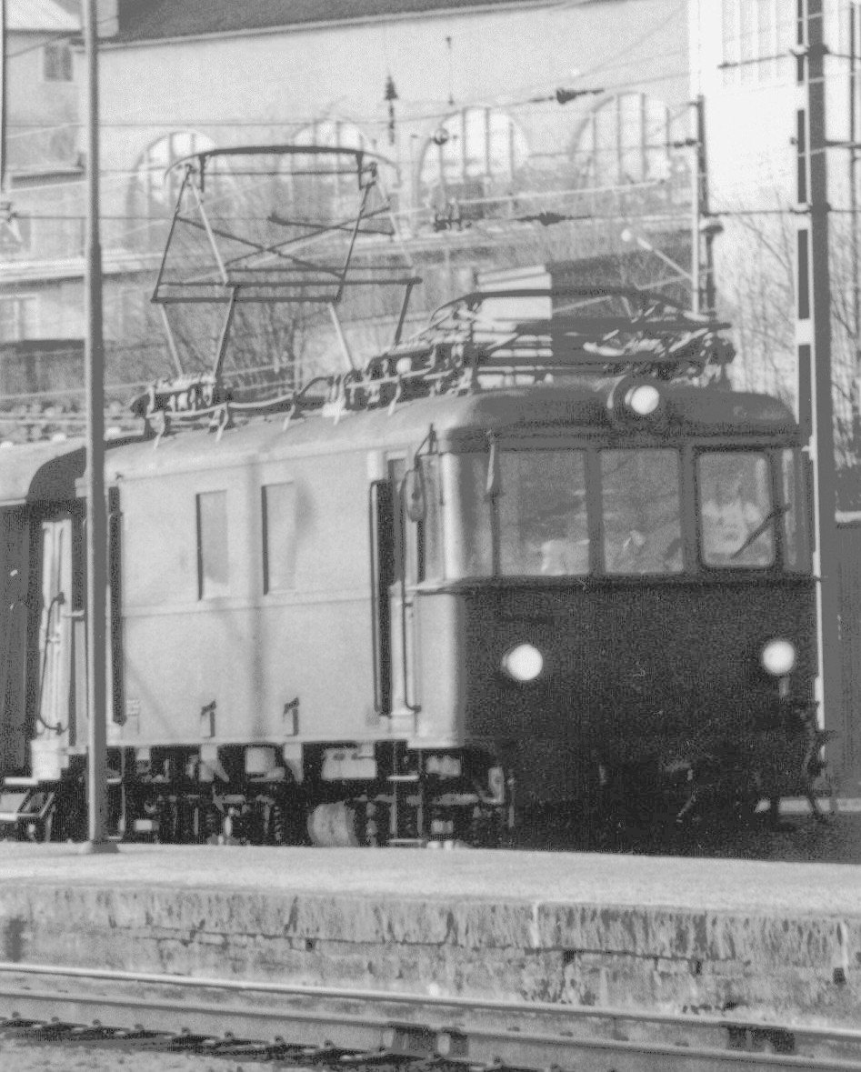 Persontåg draget av Ellok Bdp 3255 inkommer på Stockholms östra station. Lokförare är Ulla-Brita Neibig, som blev Sveriges första kvinnliga lokförare den 10 juni 1972.